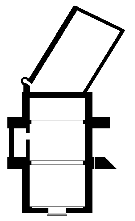 Planta de l'ermita de Sant Benet i Santa Llúcia d'Alcalà de Xivert